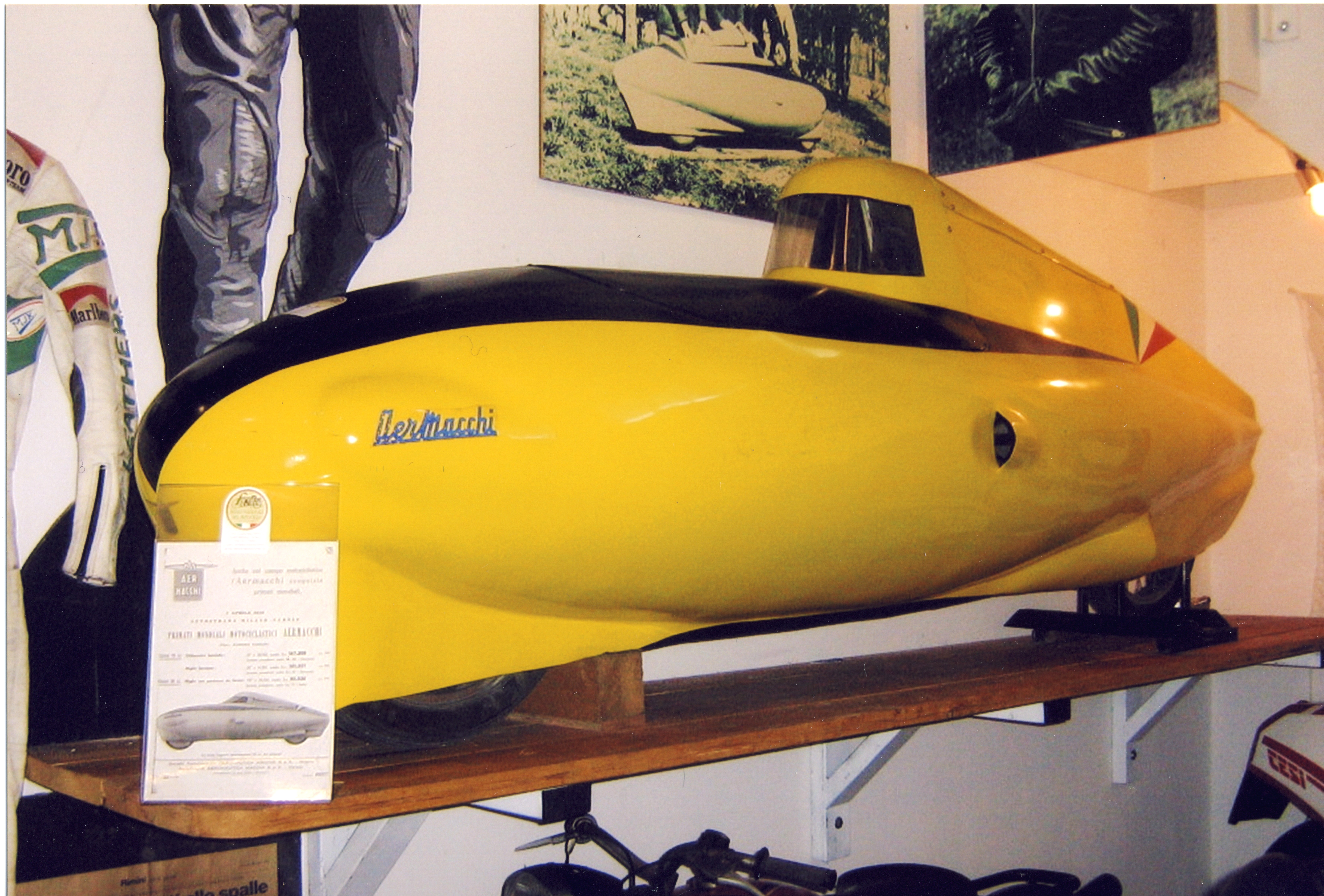 LinTo-Aermacchi Record, progettata e realizzata da Lino Tonti e Massimo Pasolini nel 1955